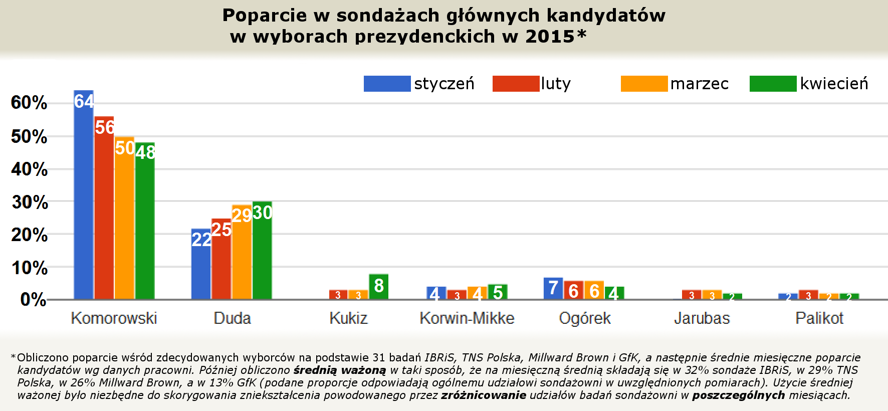 Obliczono poparcie wśród zdecydowanych wyborców na podstawie 31 badań IBRiS, TNS Polska, Millward Brown i GfK, a następnie średnią ważoną w taki sposób, że na miesięczną średnią składają się w 32% sondaże IBRiS, w 29% TNS Polska, w 26% Millward Brown, a w 13% GfK (podane proporcje odpowiadają ogólnemu udziałowi sondażowni w uwzględnionych pomiarach). Użycie średniej ważonej było niezbędne do skorygowania zniekształcenia powodowanego przez zróżnicowanie udziałów badań sondażowni w poszczególnych miesiącach.